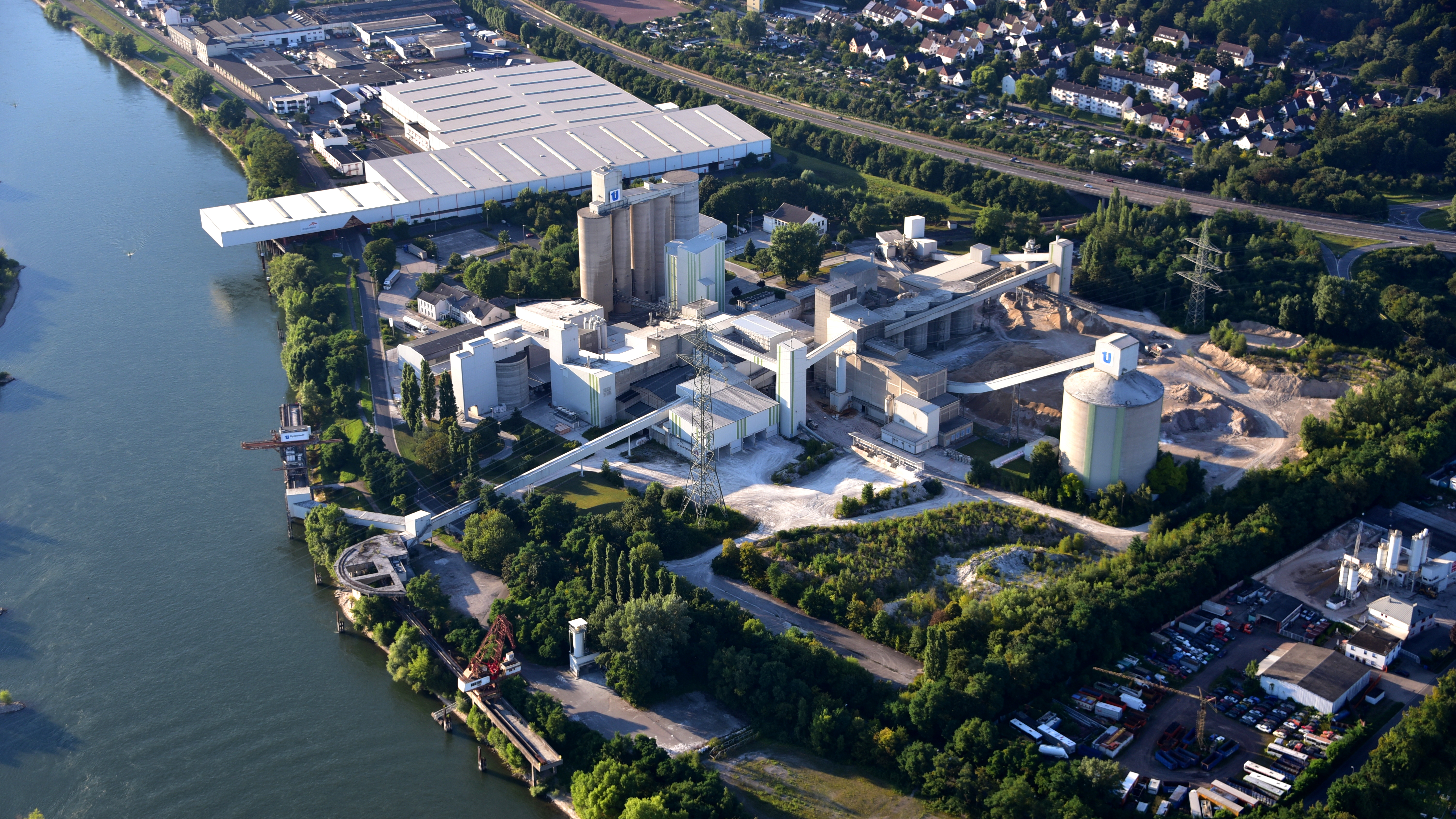 Neuwied, Dyckerhoff (Zementhersteller), Luftaufnahme (2016)